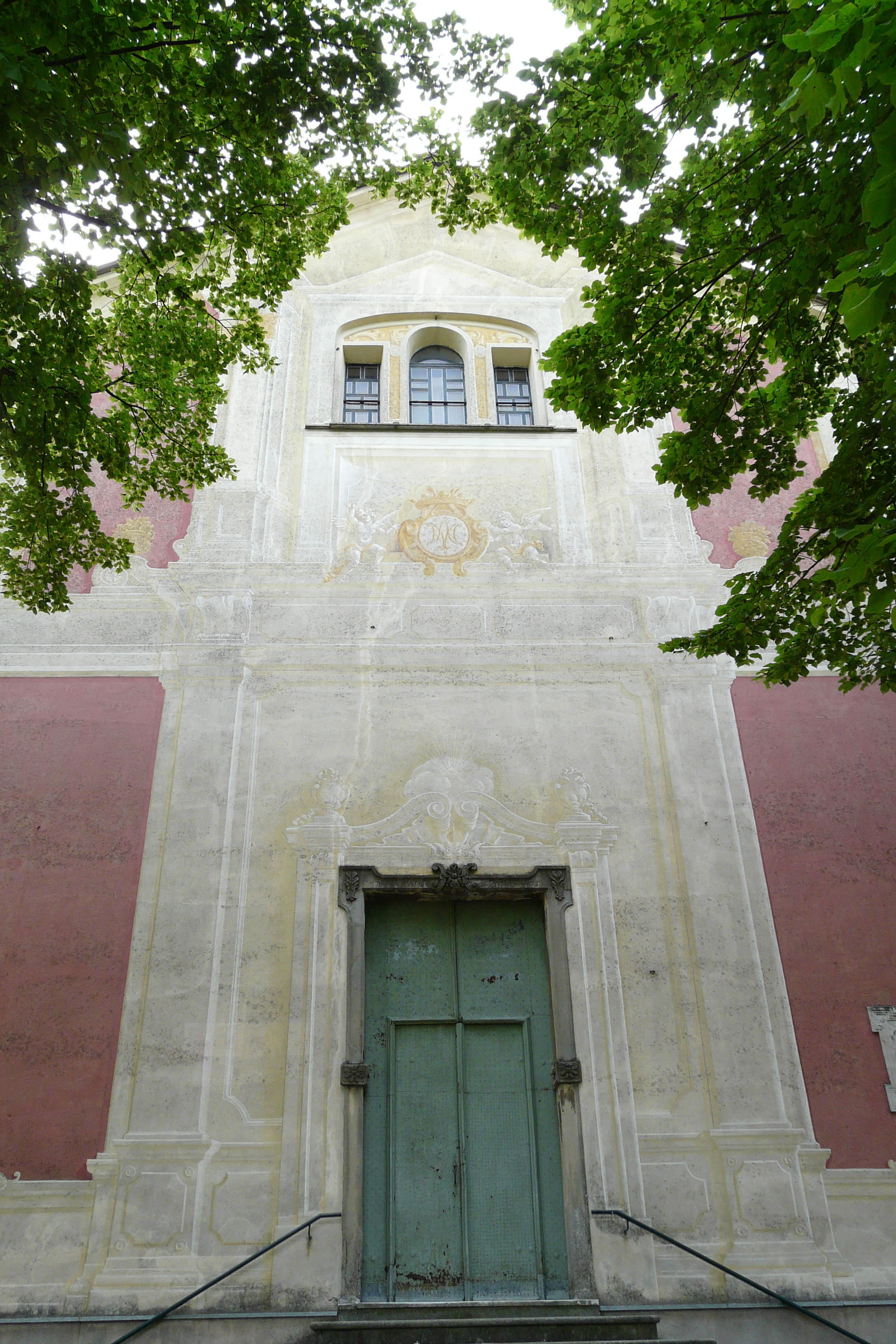 Facciata della Chiesa di Nostra Signora delle Grazie, Vobbia, Liguria, Italia